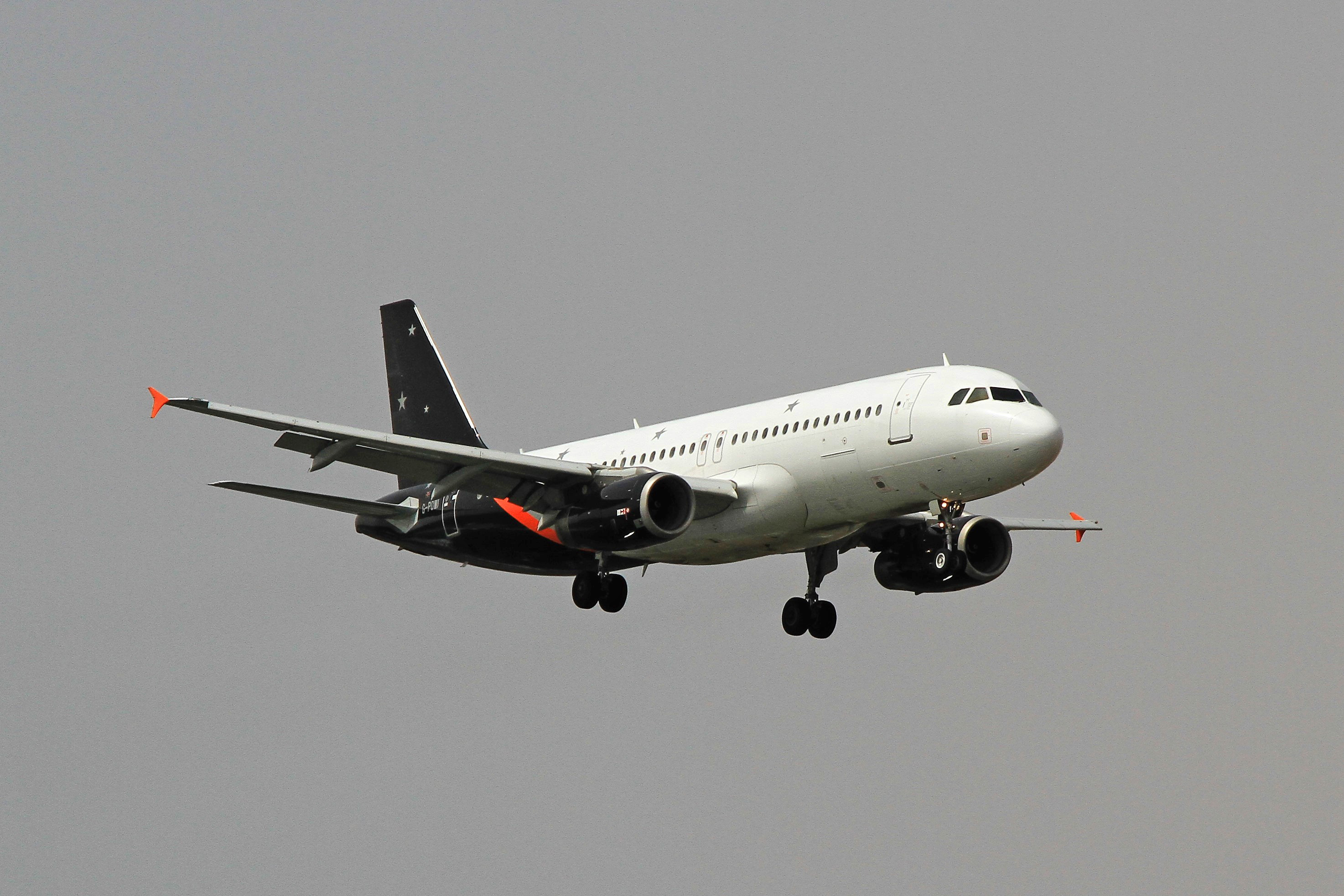 G-POWI A320 Titan Lanzarote 31-03-2017